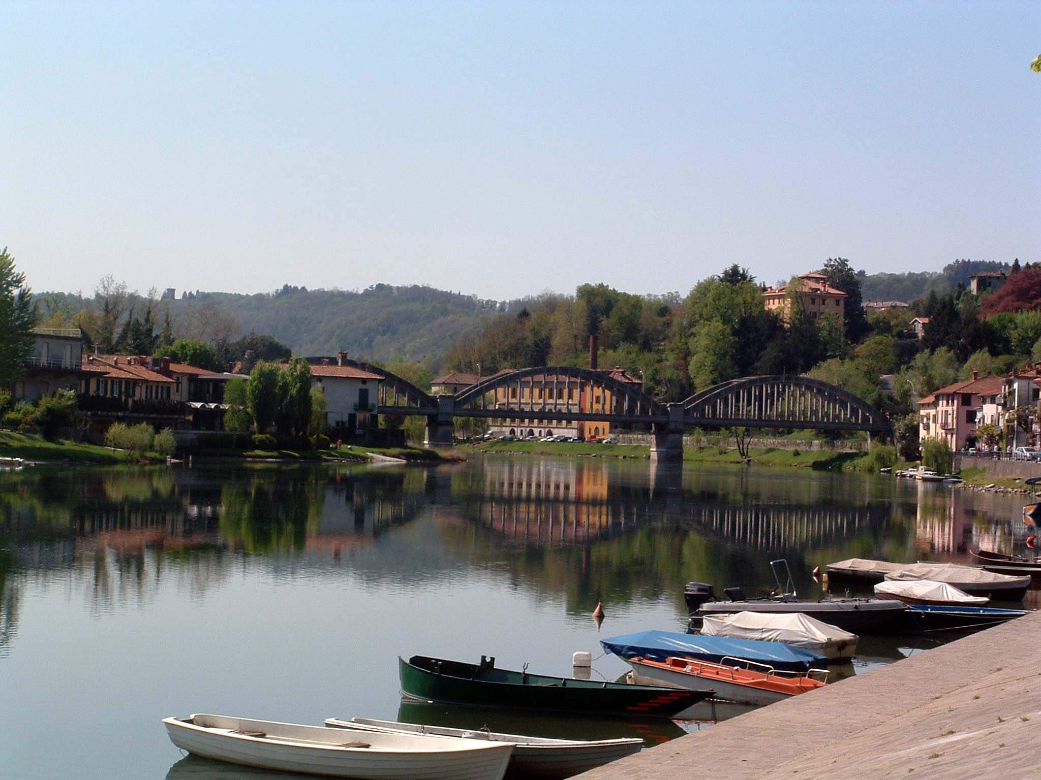 Ponte sul fiume Adda a Brivio. Copyright (c) 2006 Matteo Balossi.